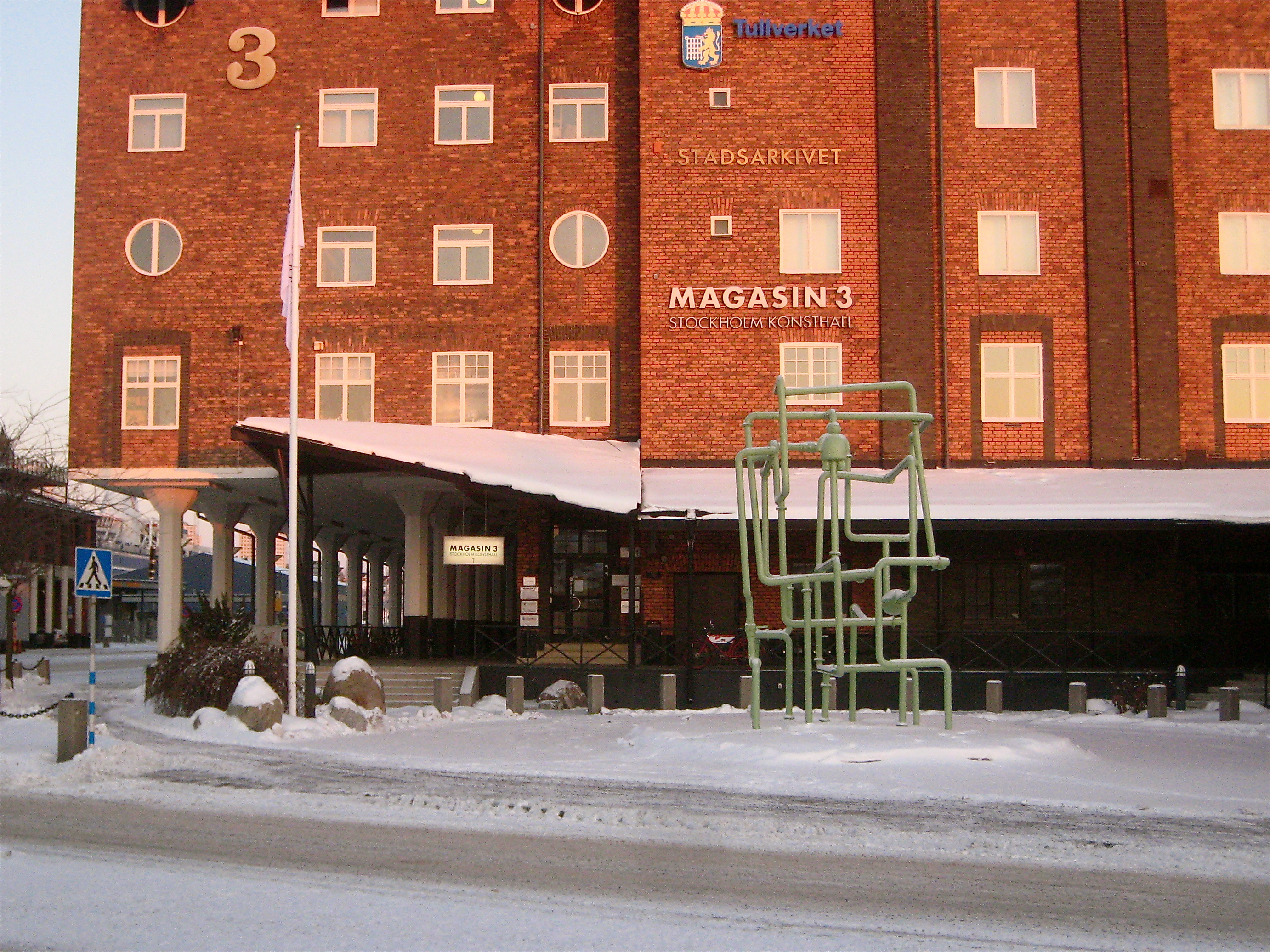 Magasin 3 Stockholms konsthall. Framför byggnaden står skulpturen Mentalt sällskap skapad av Truls Melin.